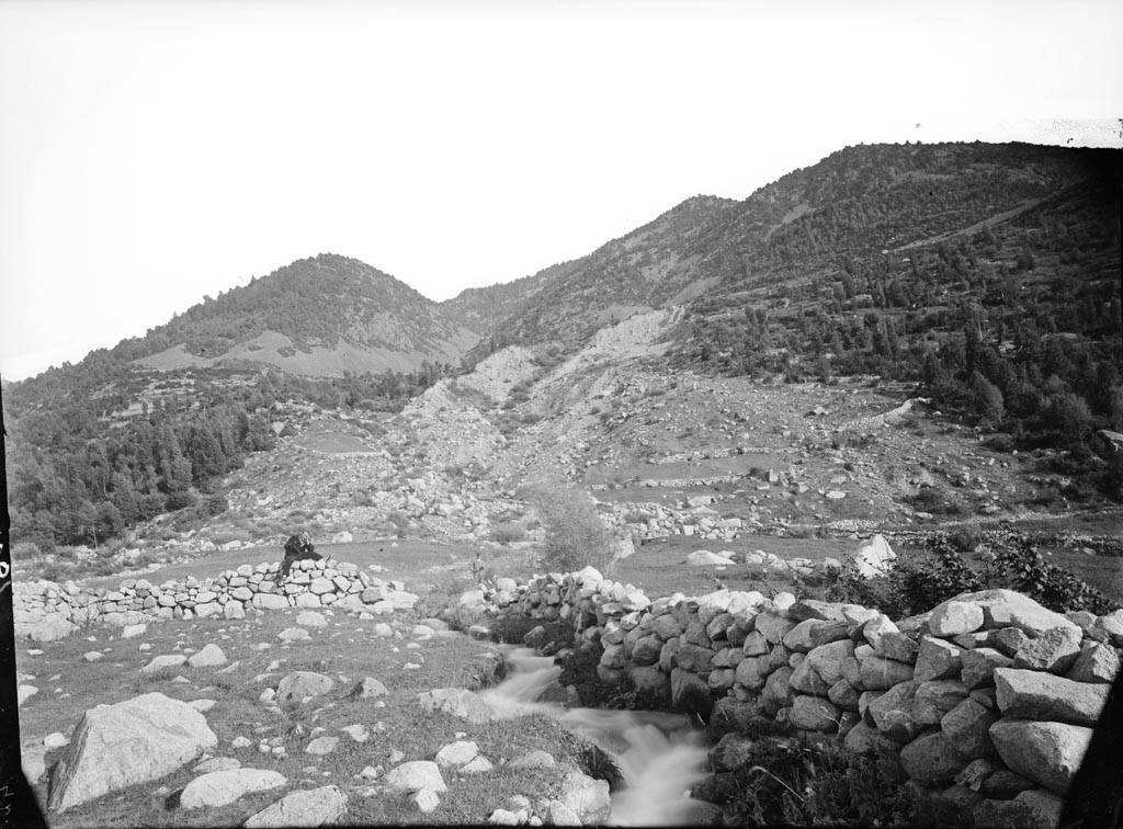 Imatge